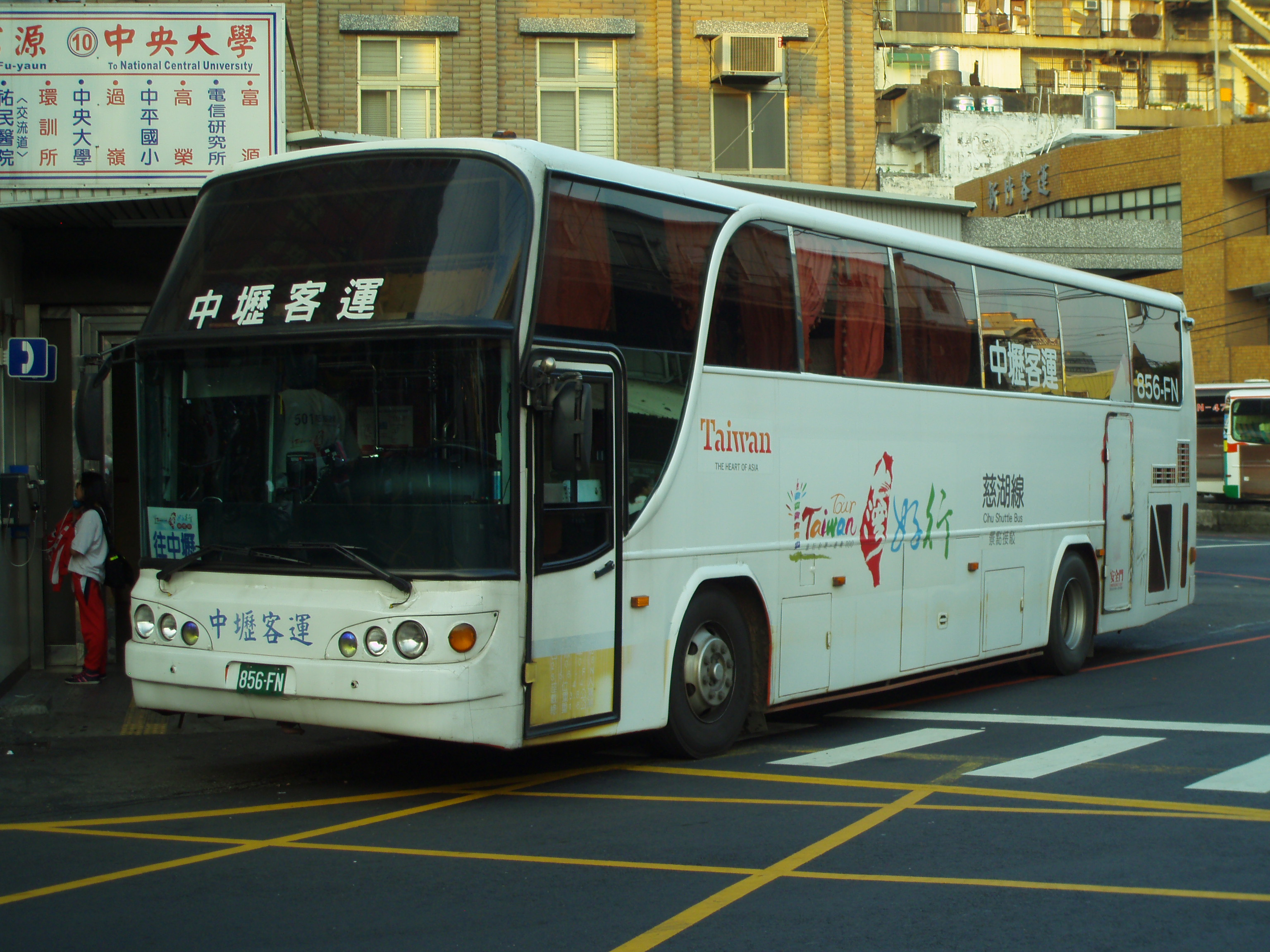 2008年中壢客運共採購6輛大車(853-FN~859-FN)，856-FN.858-FN.859-FN為原台灣好行慈湖線配車